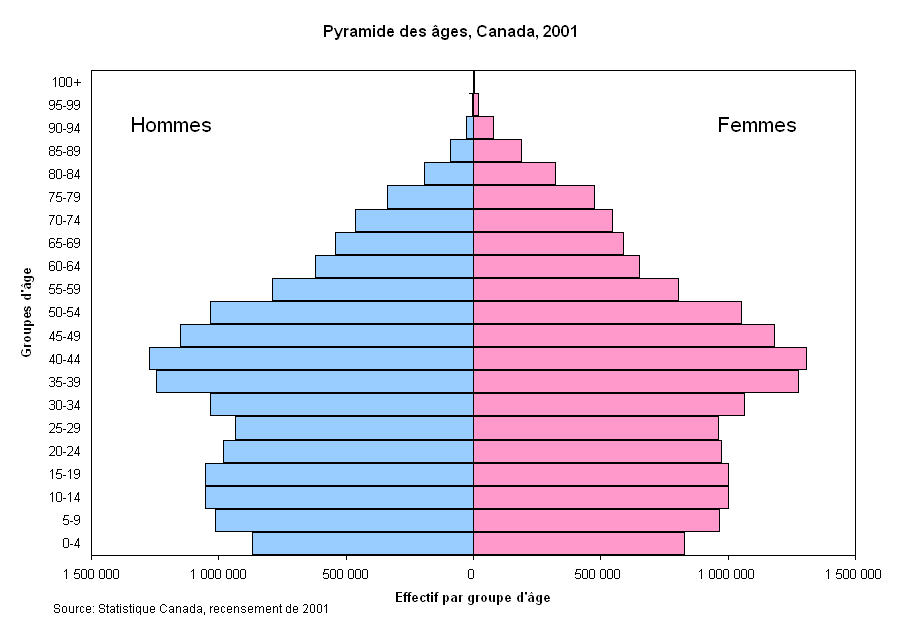 Pyramides des âges, Canada, 2001